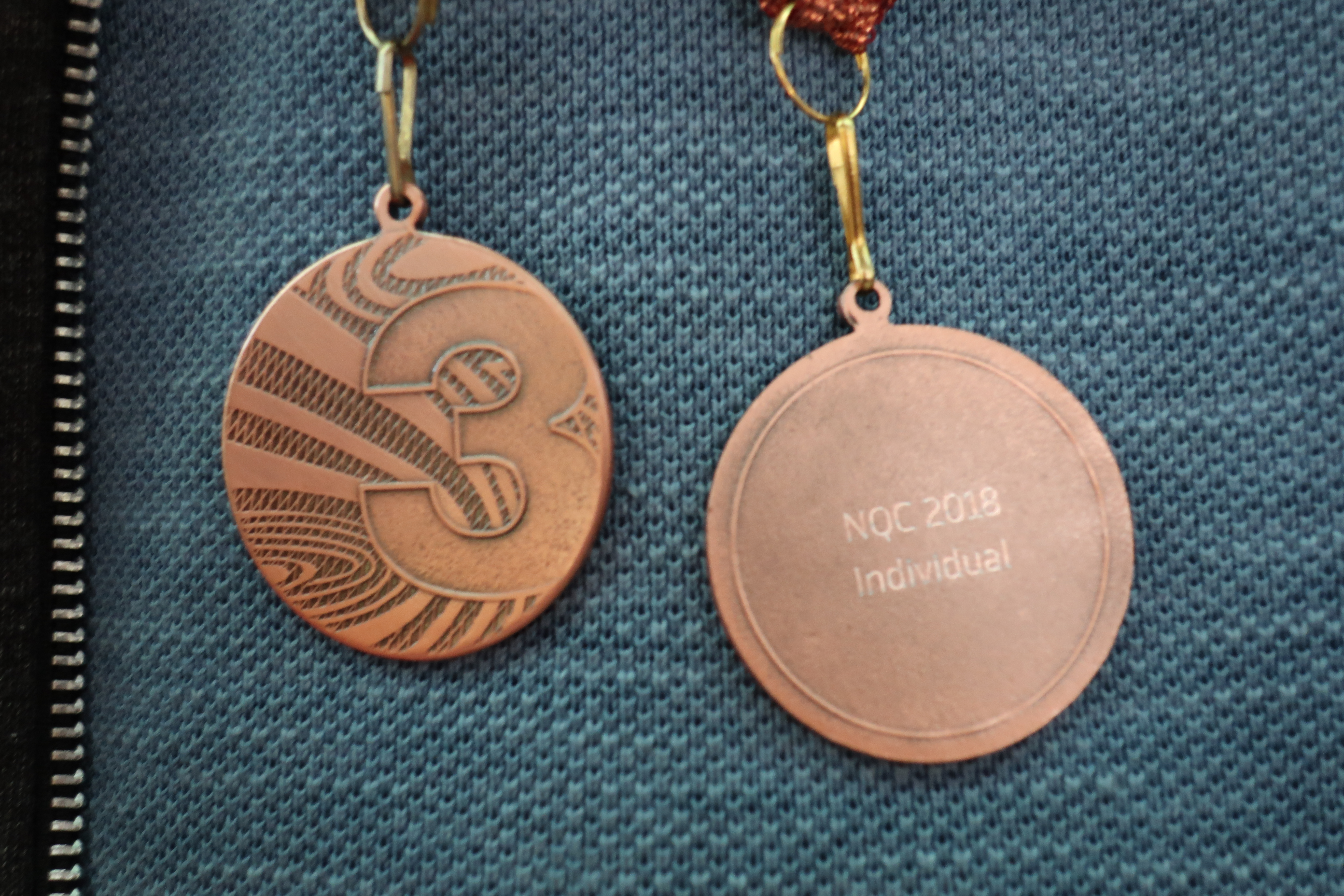 Tero Kalliolevon pronssimitalit tietokilpailun Pohjoismaiden-mestaruuskilpailuissa 2018.